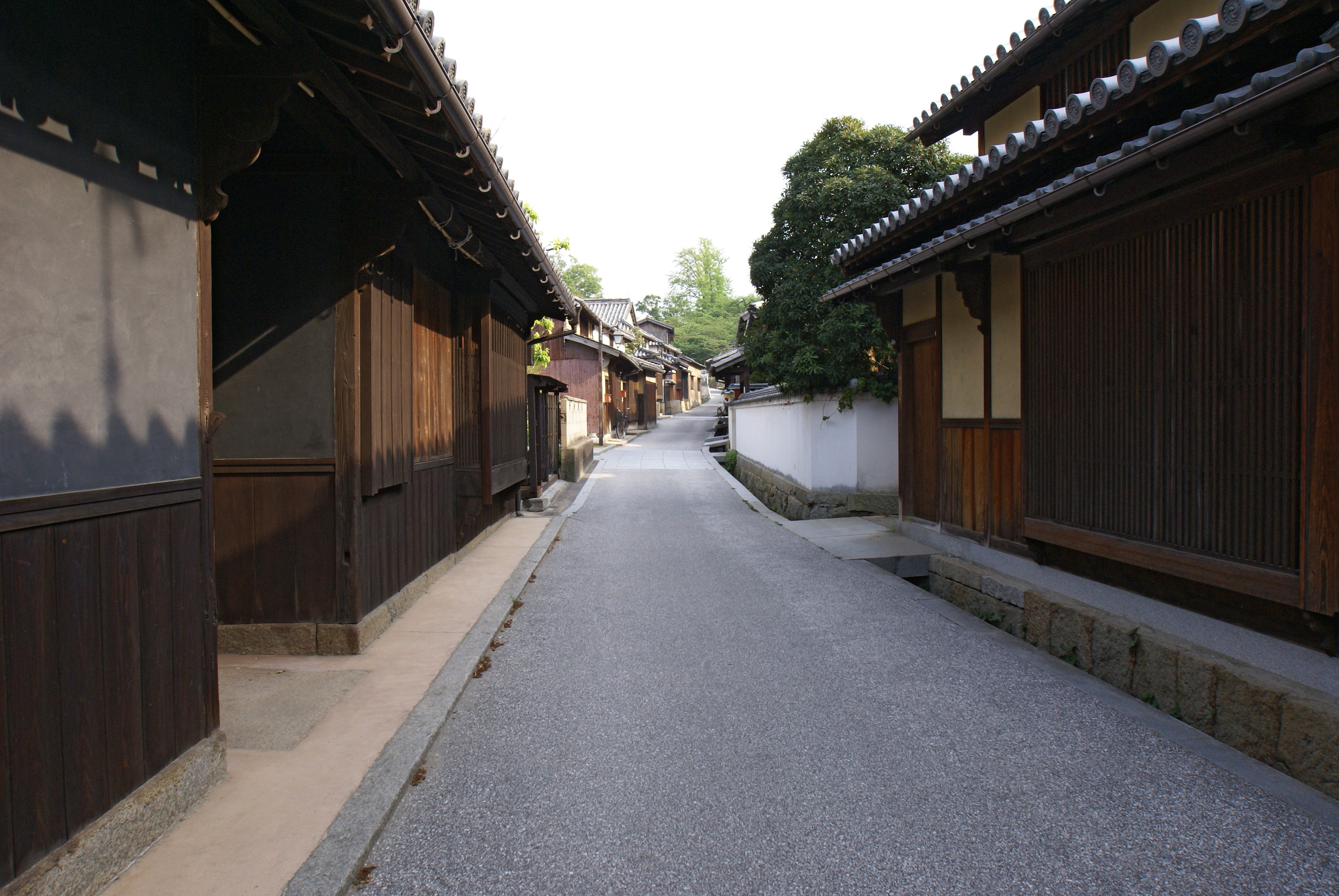 Kasajima, Hon-jima of Shiwaku Islands (Marugame, Kagawa prefecture, Japan)